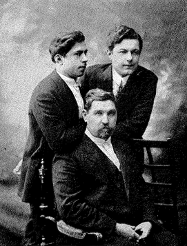 И. С. Проханов с сыновьями Ярославом и Всеволодом